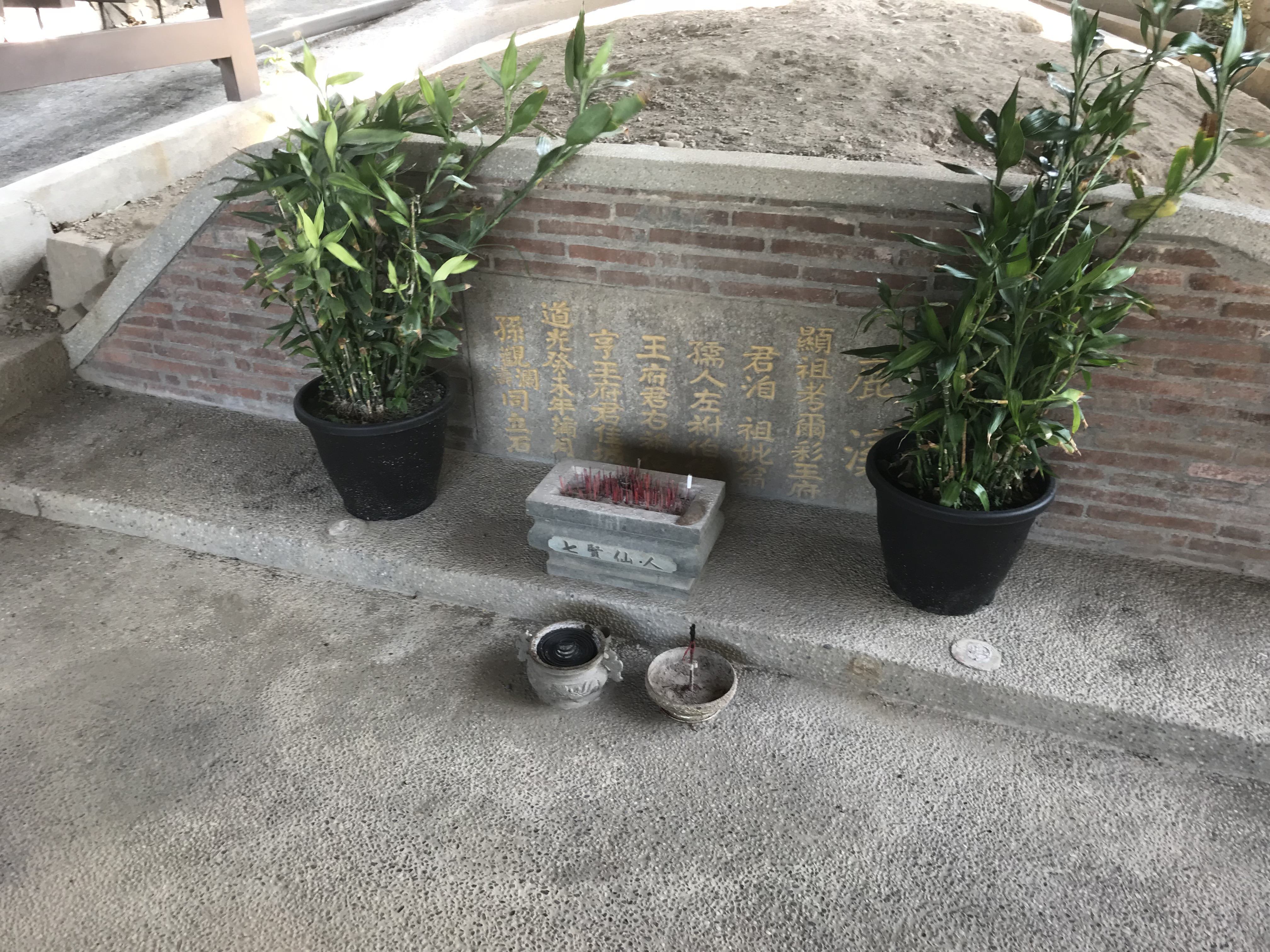 七壙古墓墓碑